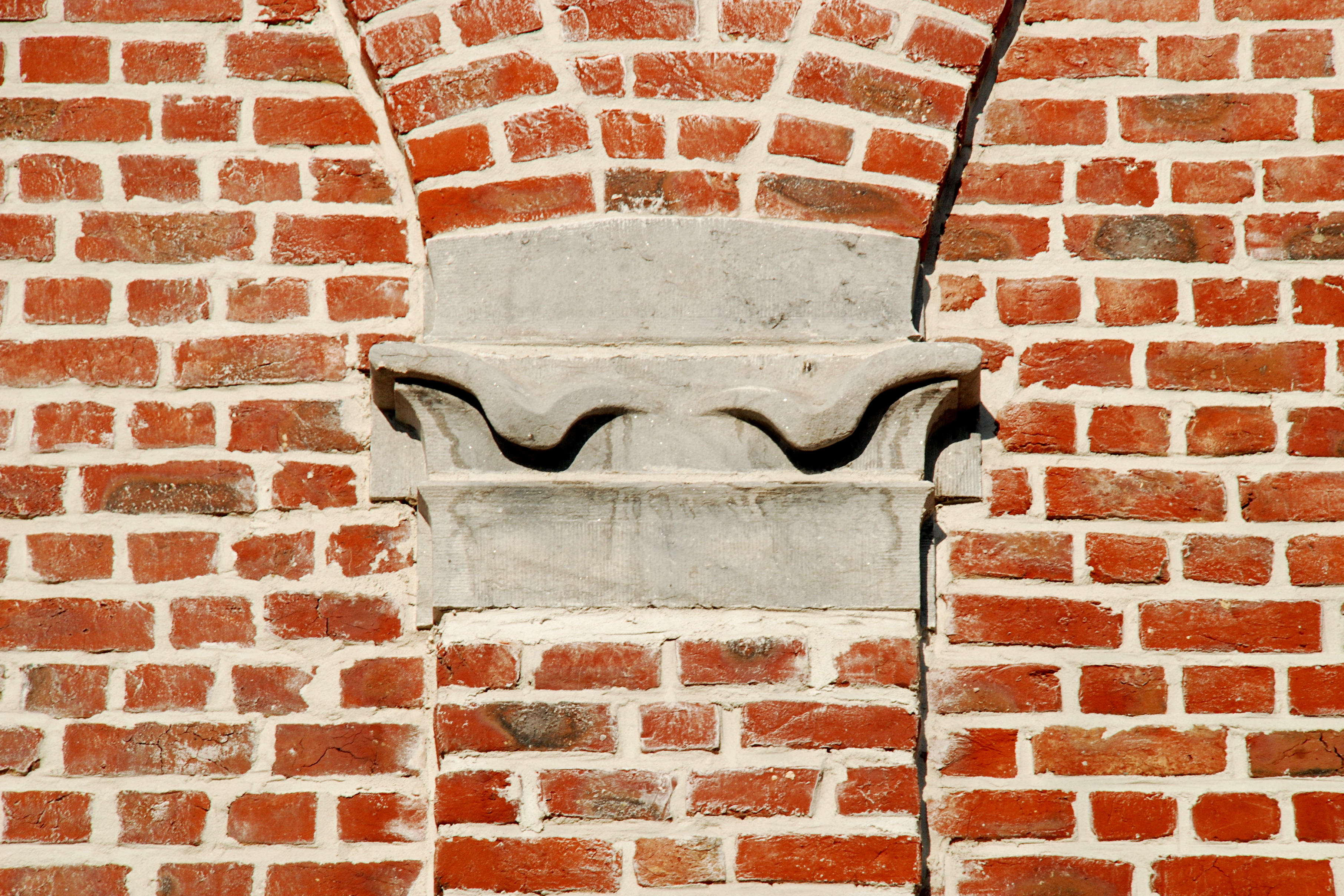 Belgique - Watermael - Entrepôt Van Cutsem (néo-gothique, architecte Albert Roosenboom, 1902)